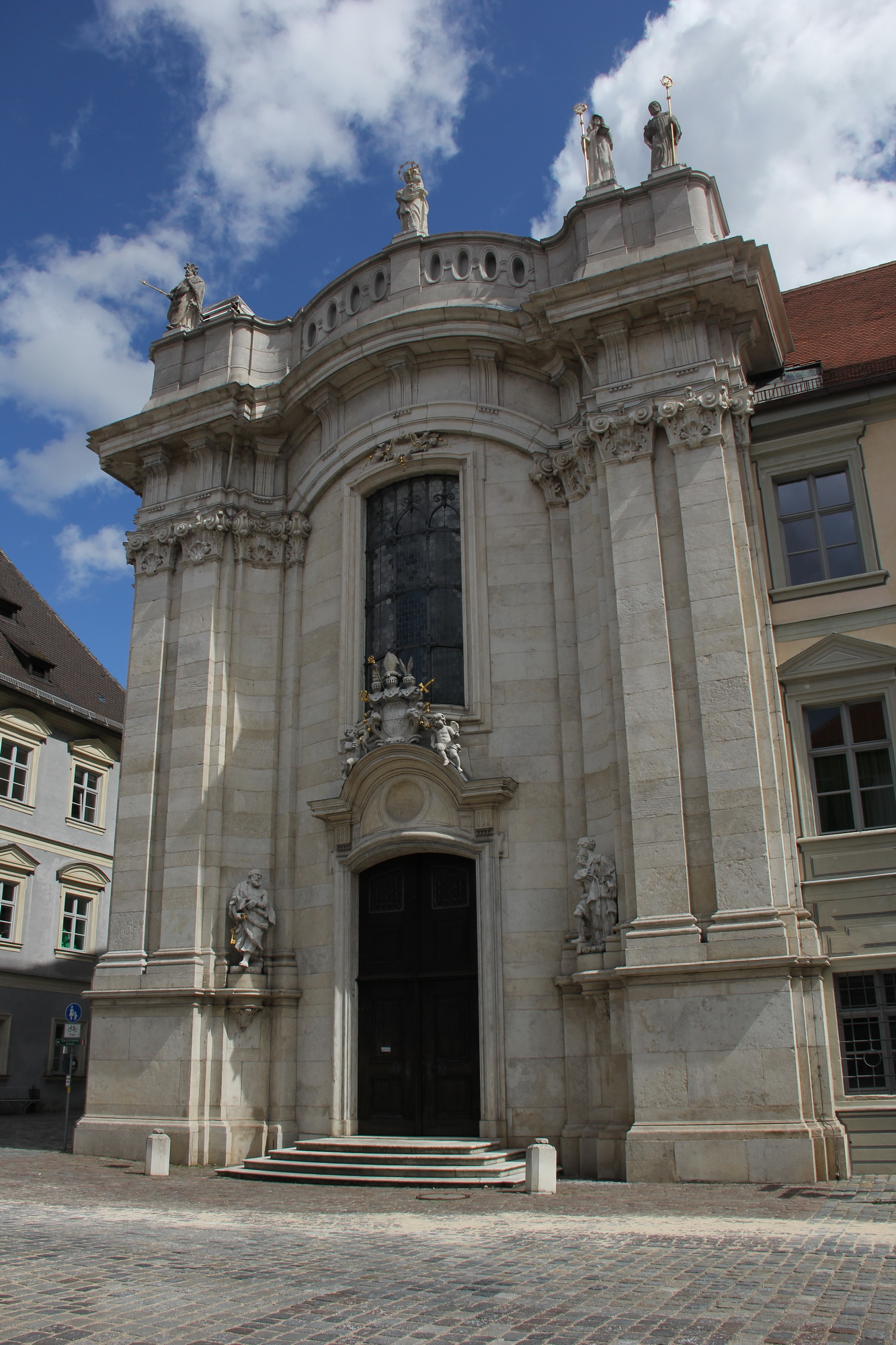 Eichstätt Cathedral Native nameDom zu EichstättLocationEichstätt, Upper Bavaria, GermanyCoordinates48° 53′ 30.86″ N, 11° 11′ 00.56″ E Authority control VIAF: 247706570 GND: 4218076-4